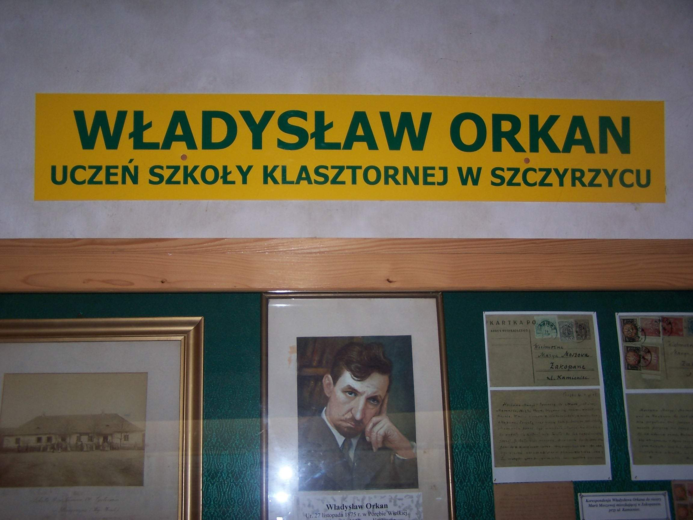 Photo by Piorus. Gablota Władysław Orkana w Szczyrzycu.